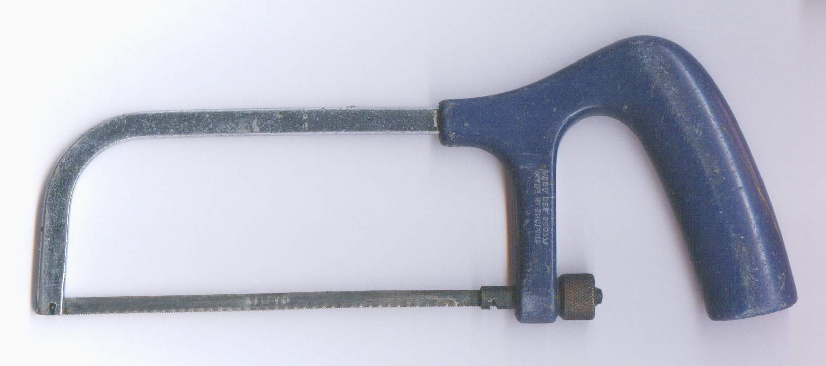 Juniorzaagje, luxe uitvoering met handvat. Zelf ingescand.